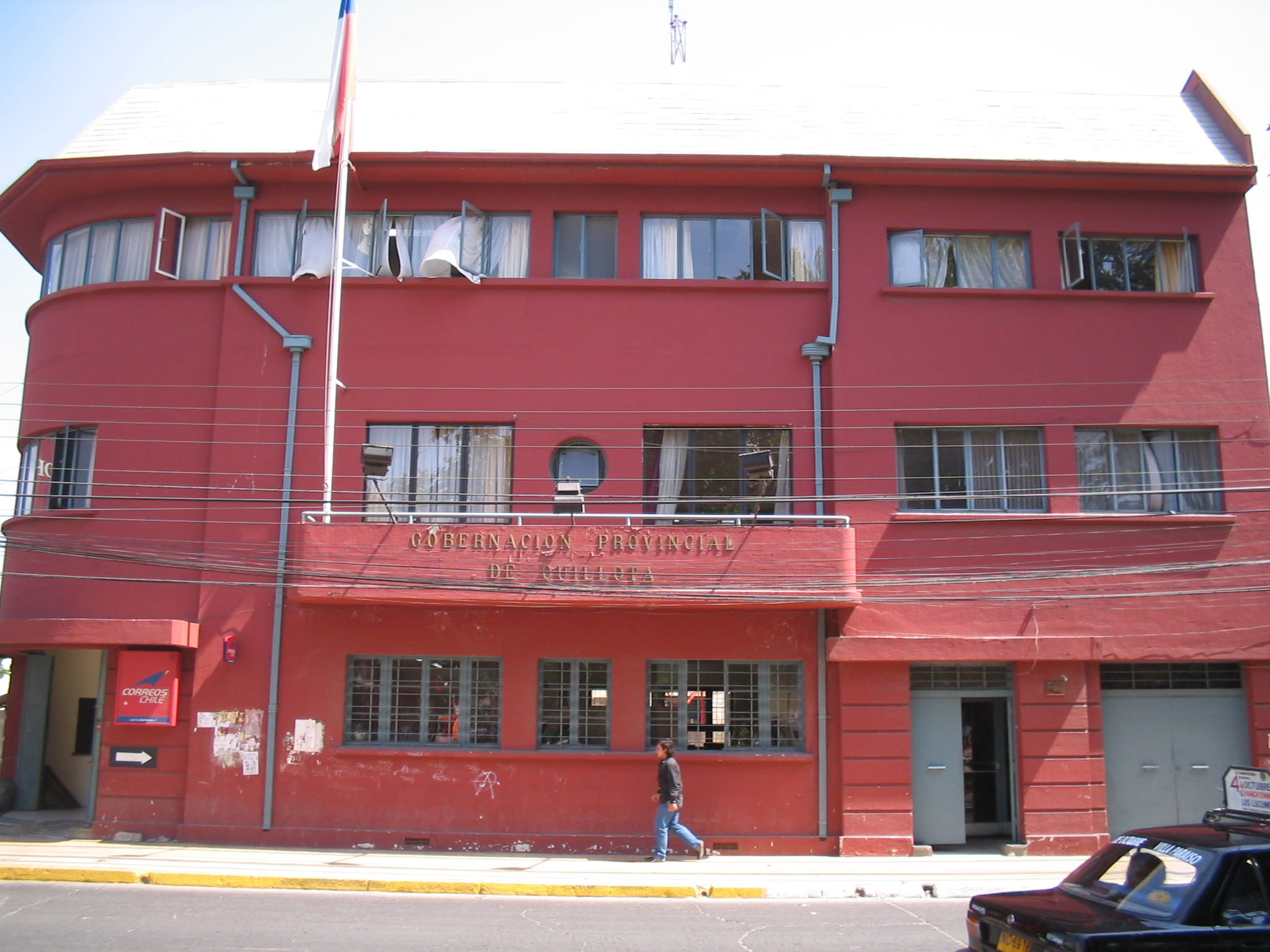 Gobernación Provincial de Quillota